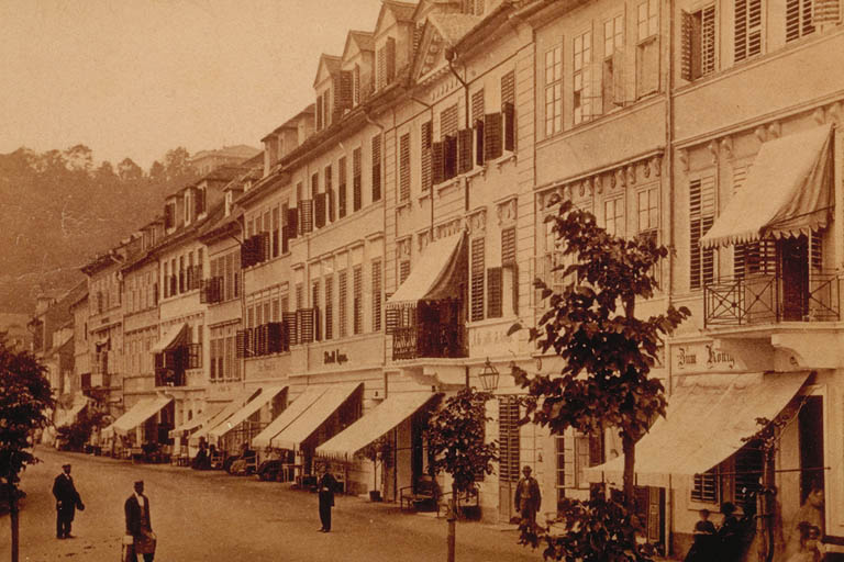 Teplice, ulice Kamenné Lázně